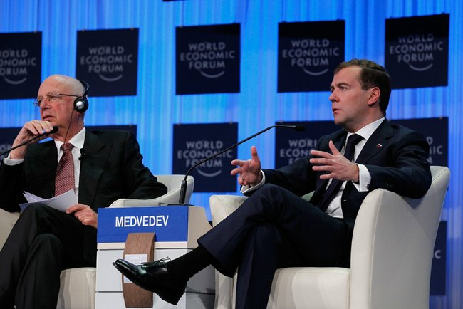 Открытие Всемирного экономического форума. С основателем и президентом форума Клаусом Швабом.